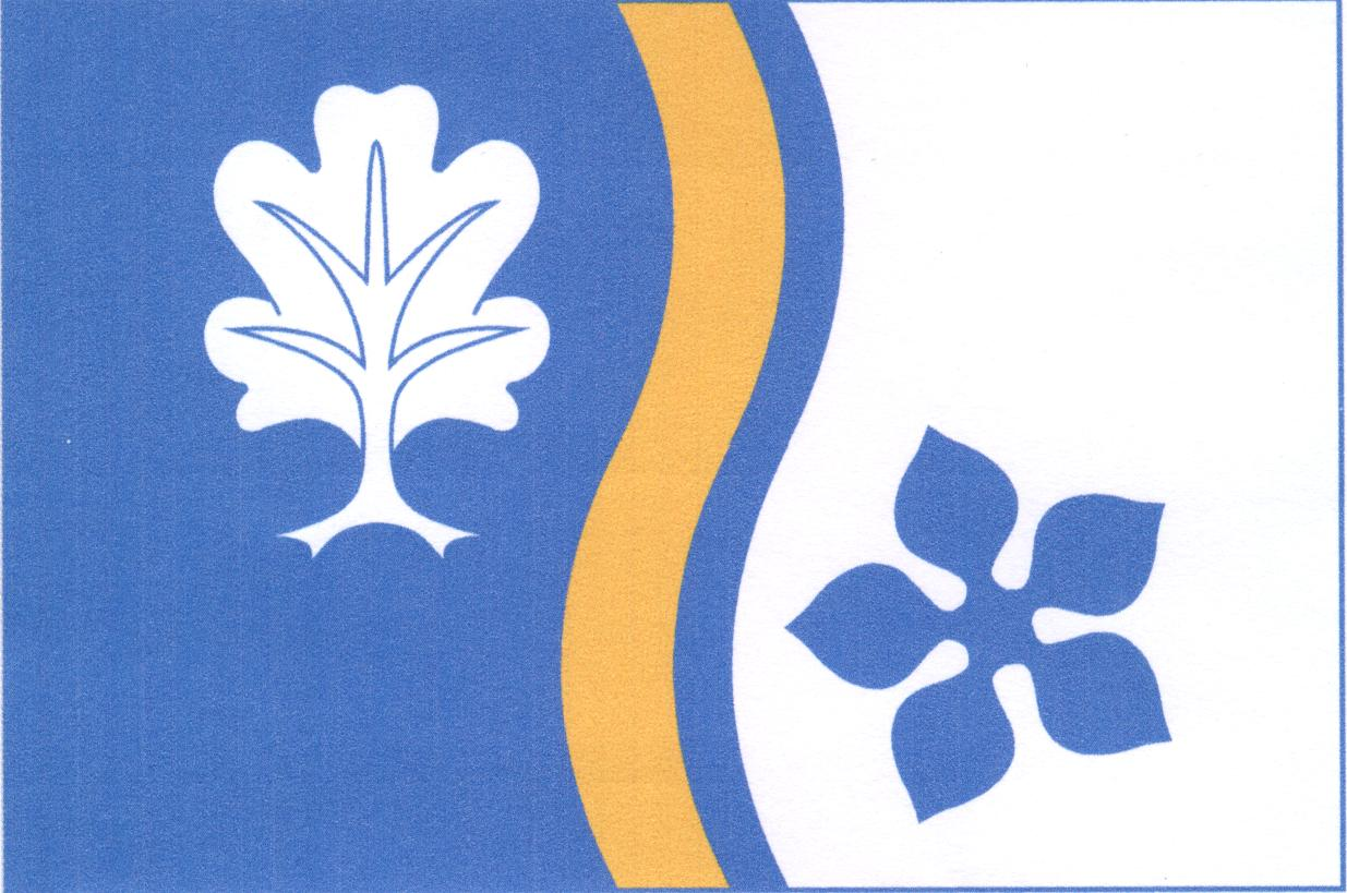 Vlajka obce Vidochov